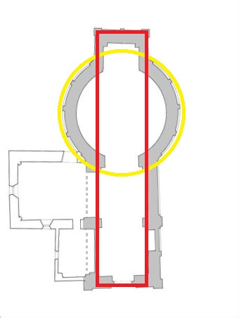 San Salvatore (Terni) pianta schematica